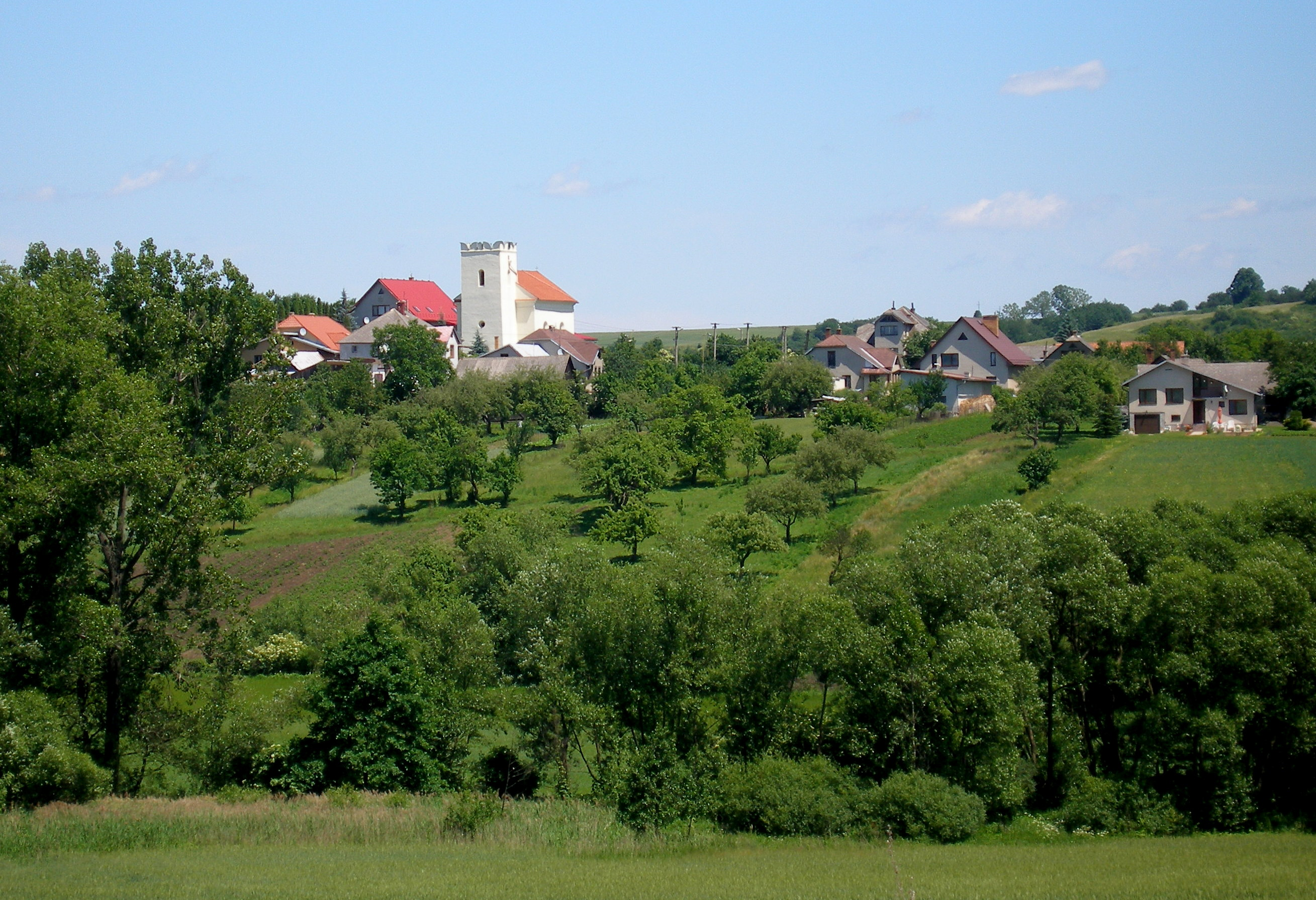 Obec Hubošovce okres Sabinov, časť Jur